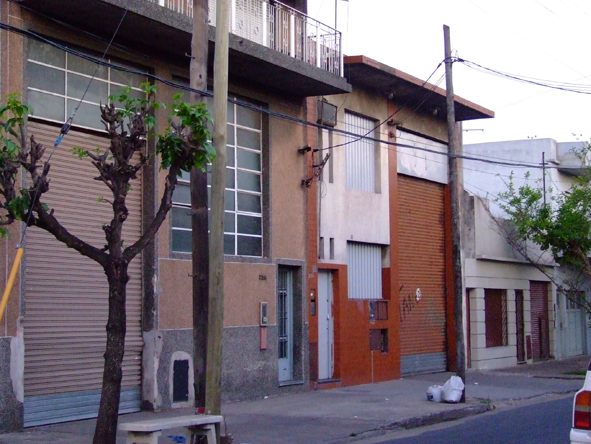 Calle Las Heras, en el barrio de Lomas del Mirador, Provincia de Buenos Aires